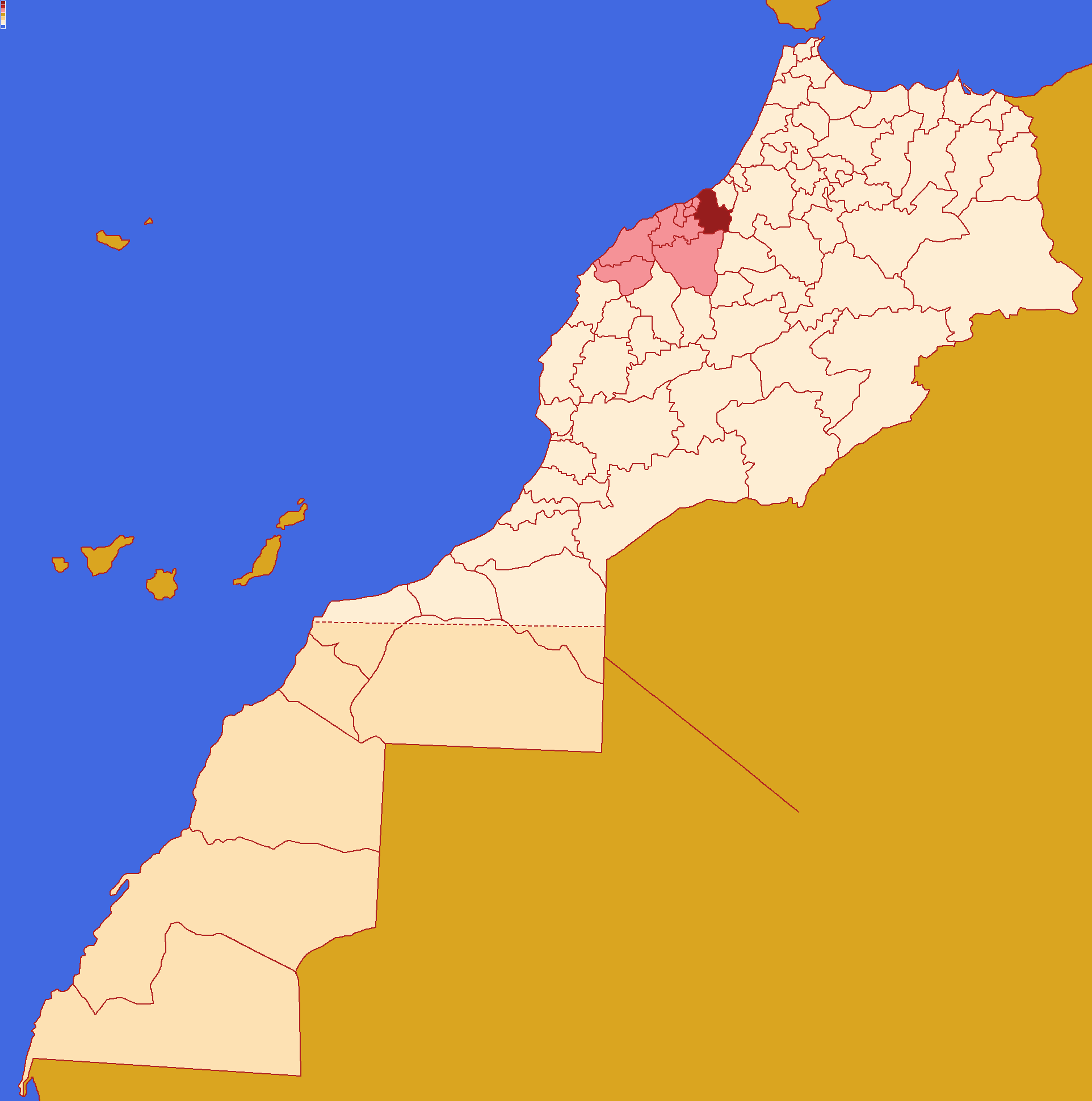 Localização da província de Benslimane , dentro da região de Casablanca-Settat e dentro de Marrocos. Conforme a reforma administrativa de 2015.